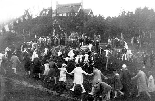 Vid Egnahemsföreningens traditionella midsommarfest på Ängen nedanför samskolan gick man förr “man ur huse” för att klä stången, leka och dansa.